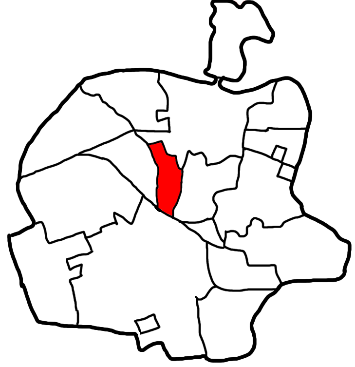 În această imagine este Făgărașul împărțit în cartiere. Cartierul în roșu este 13 Decembrie.